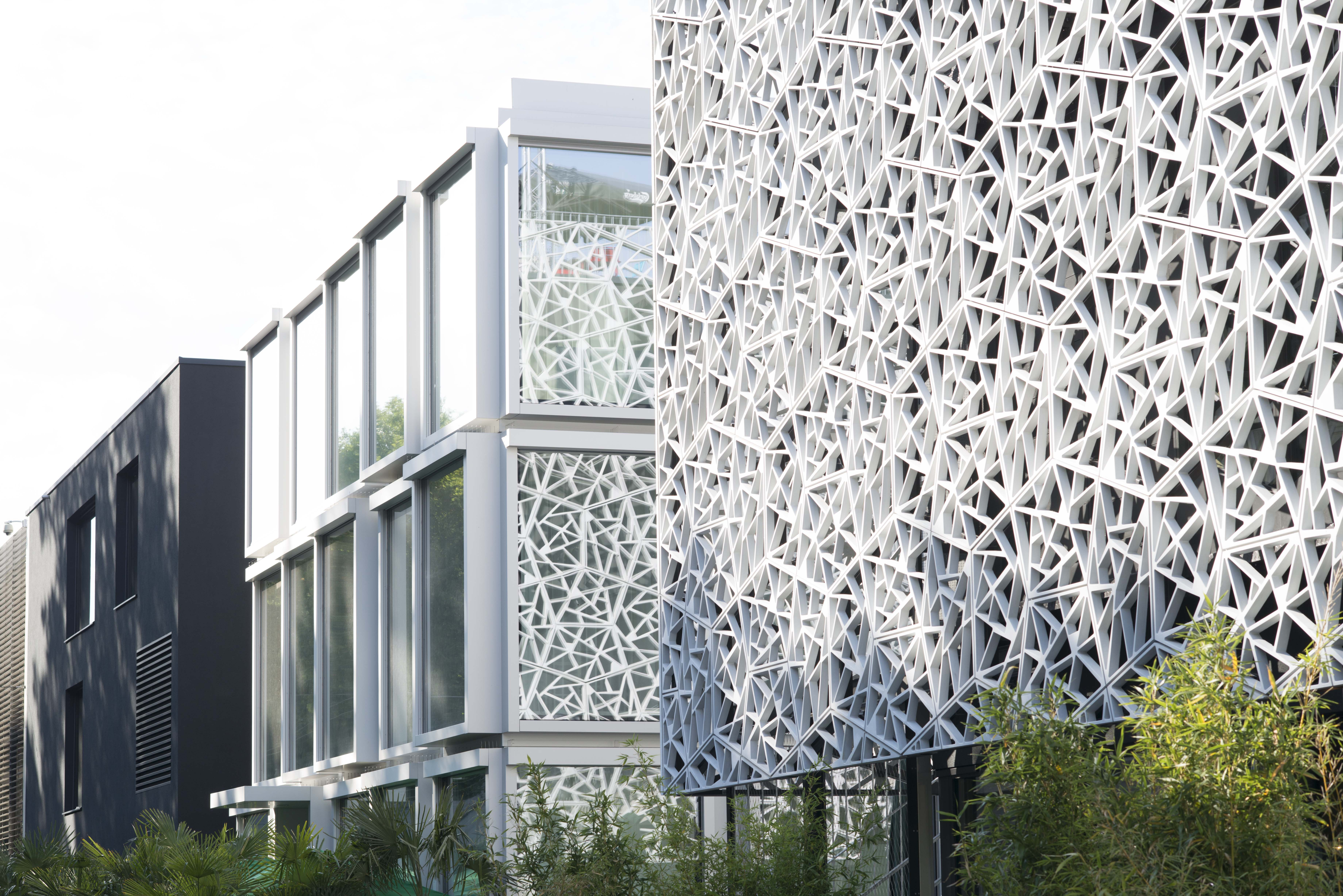 Complexe Les Pépinières - 3 batiments